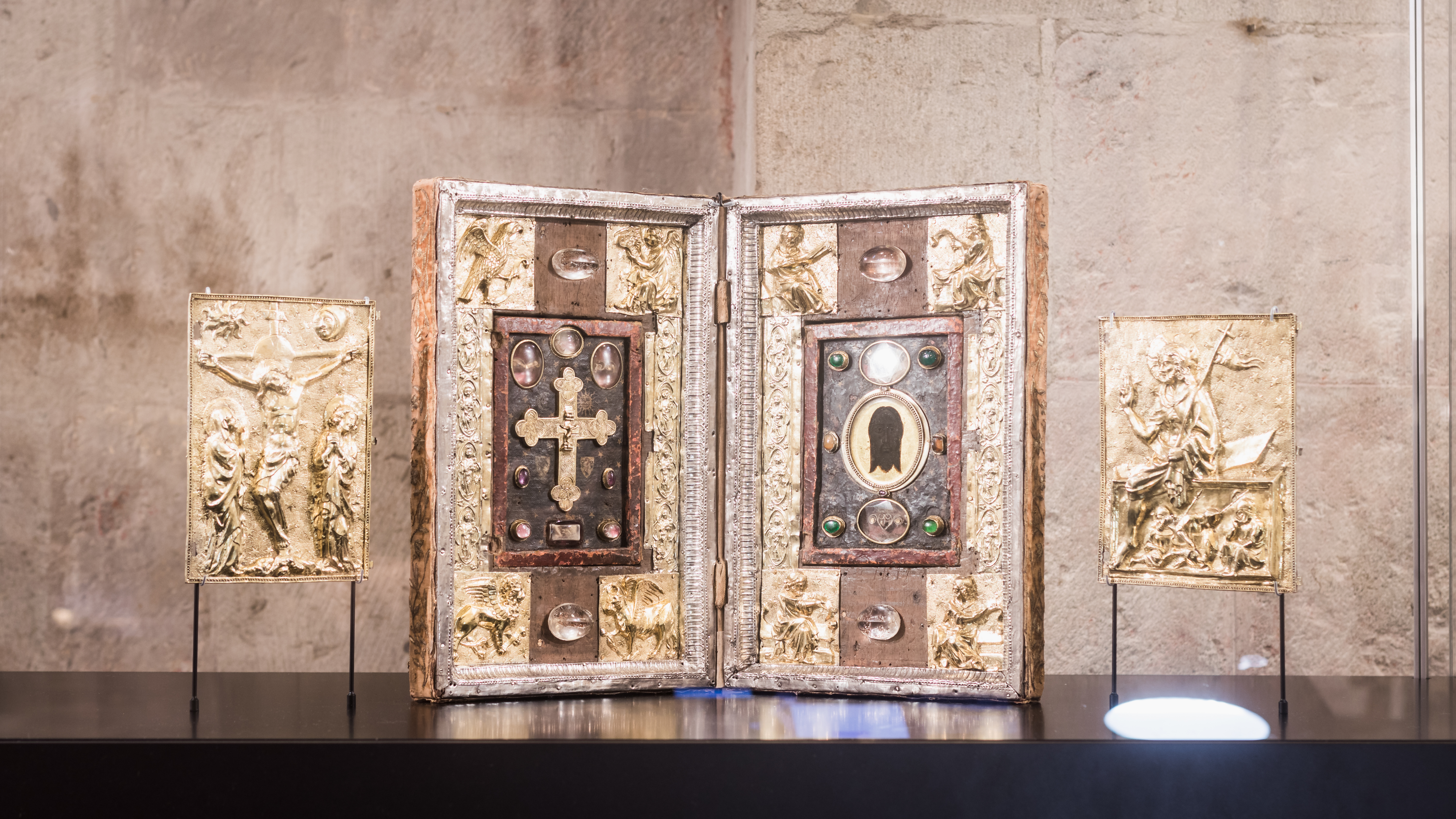 Museum Schnütgen, Köln, Reliquiendyptichon